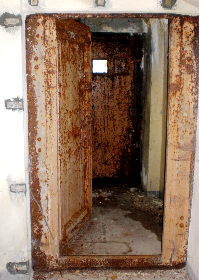 tipica porta dell'opera 3, sbarramento di Cimabanche